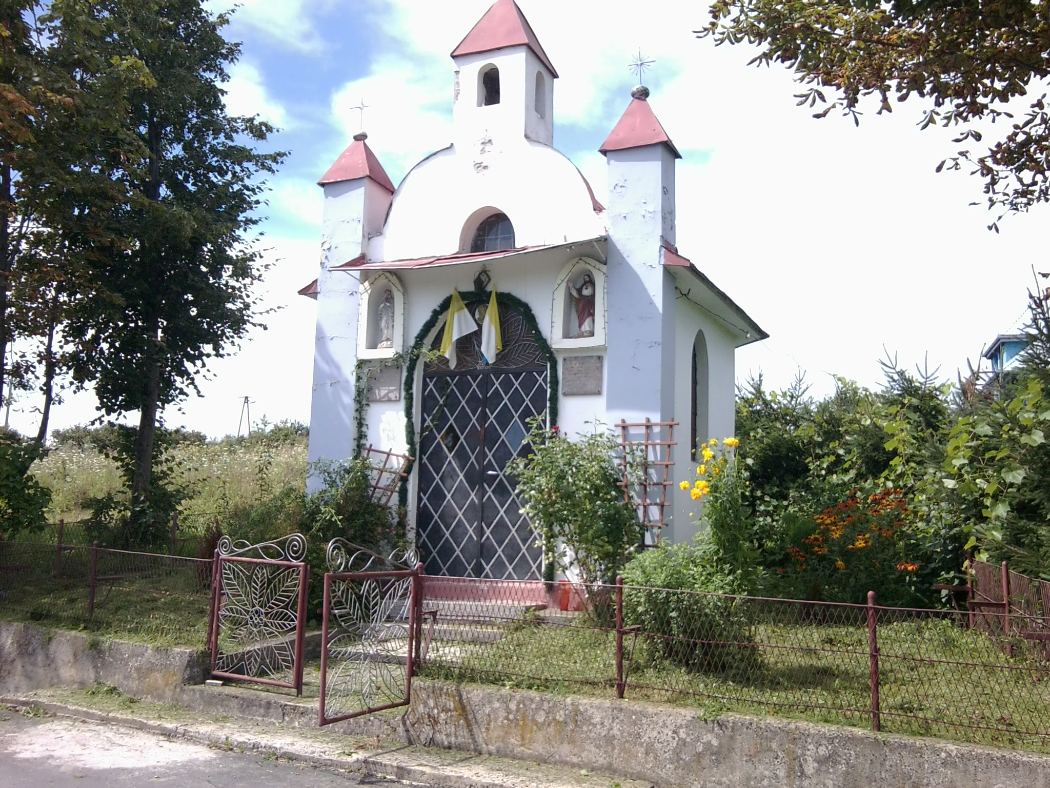 Kaplica Matki Bożej Częstochowskiej w Juraszowej